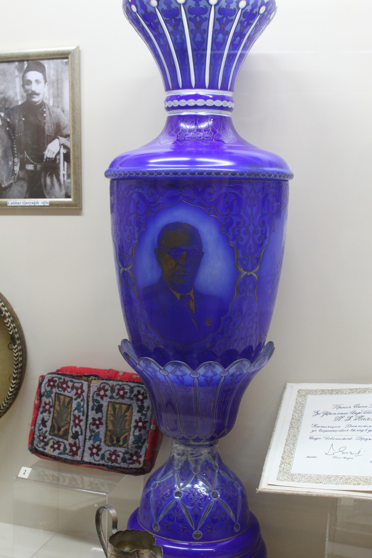 Ваза из дома музея Узеира Гаджибекова в Шуше. (Музей истории Азербайджана).